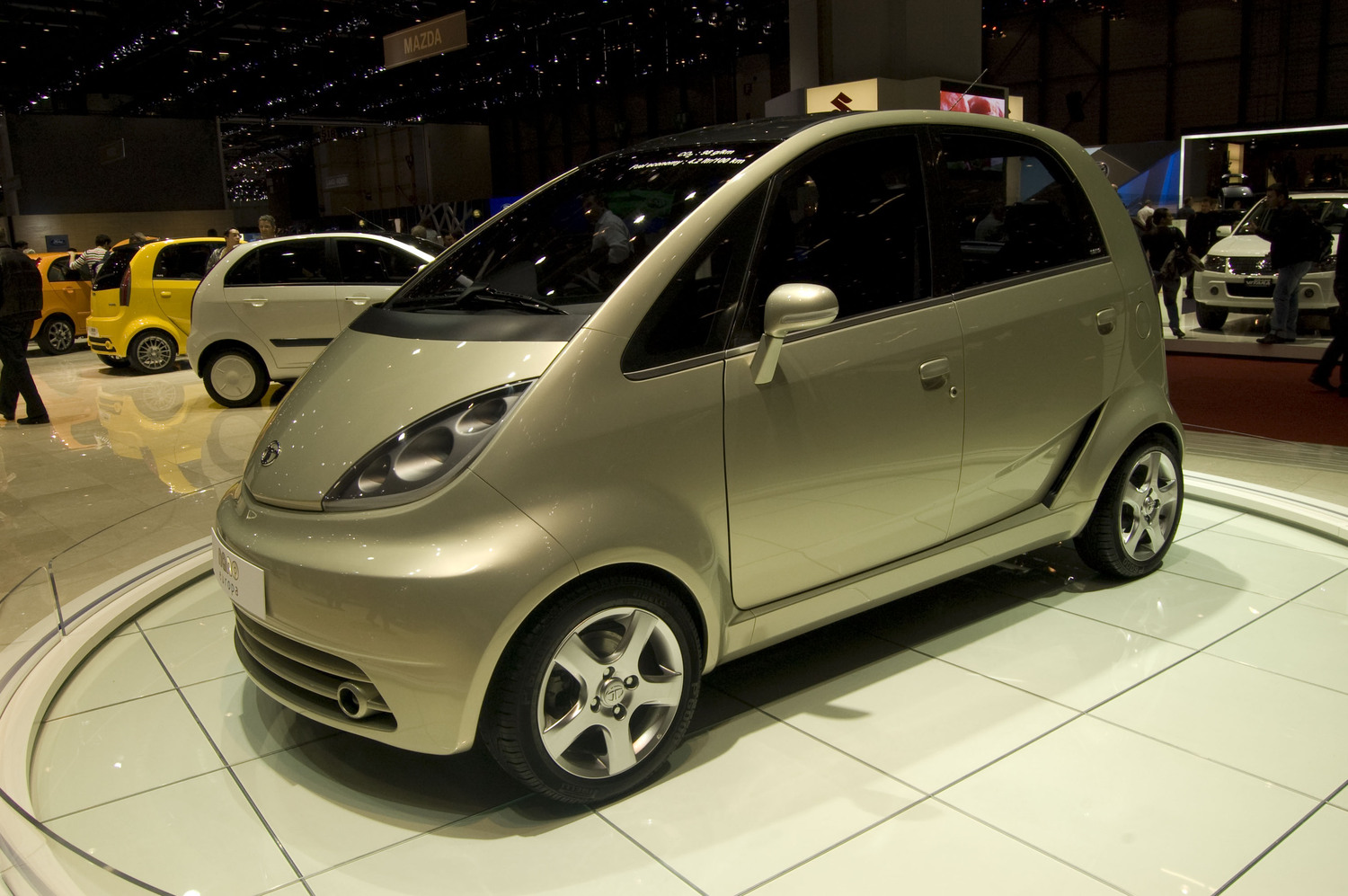 El Tata Nano Europa es la versión europea del Tata Nano, un utilitario de bajo coste que se presentó en el Salón de Ginebra de 2009.